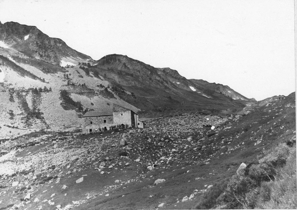 Santuari de Nostra Senyora de les Ares amb gent. Juli Soler i Santaló (Entre 1890 i 1914)